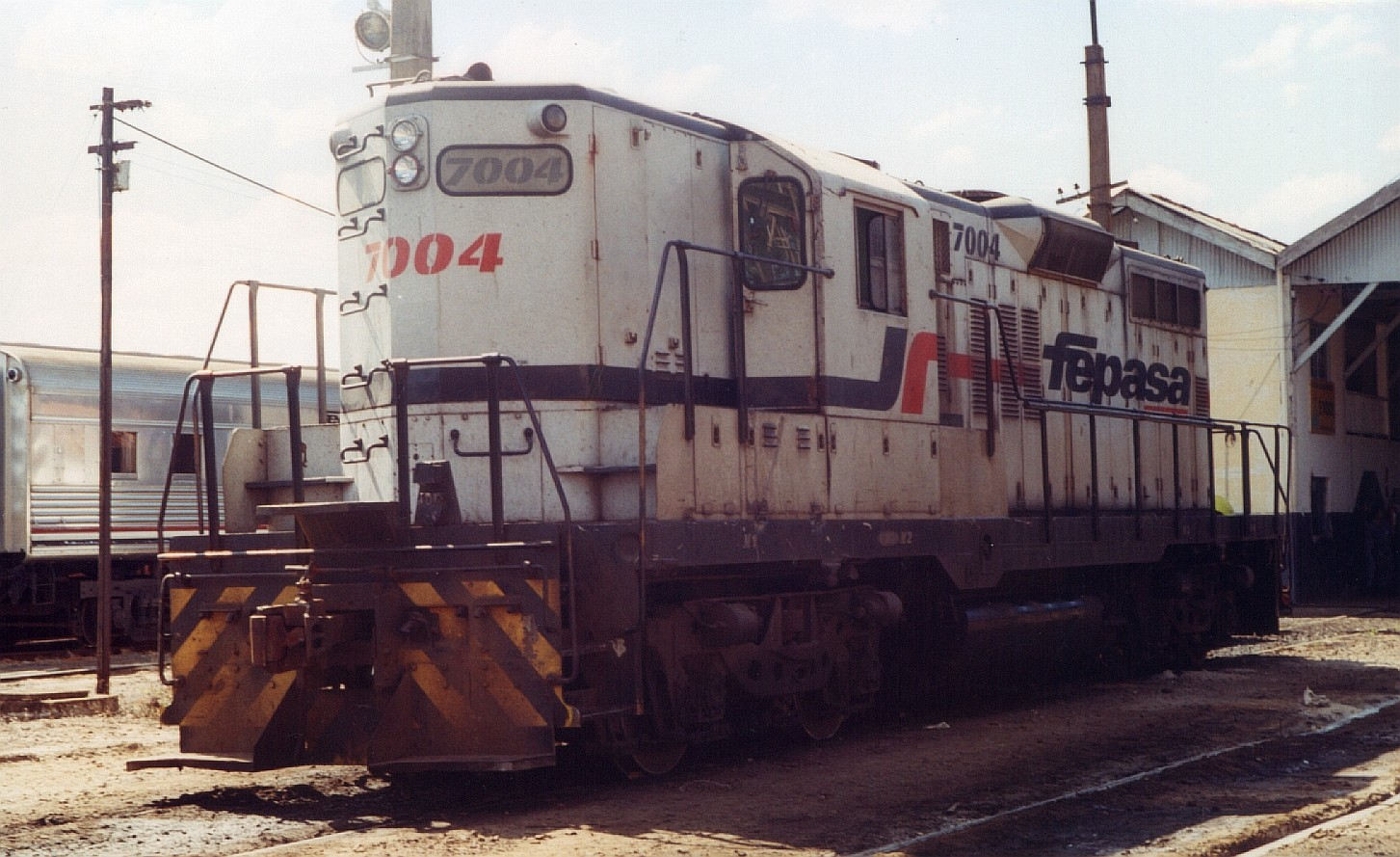 FEPASA 7004, GM GP9 Triagem Pta-Bauru-SP-Brasil